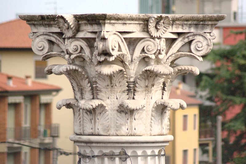 Dettaglio del capitello posto sopra la colonna della piazza centrale del Comune di Chiampo (VICENZA, ITALIA)